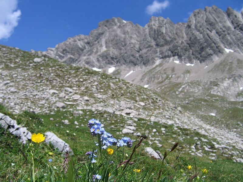 Die Südwestflanke der Noppenspitze vom gleichnamigen Kar aus gesehen